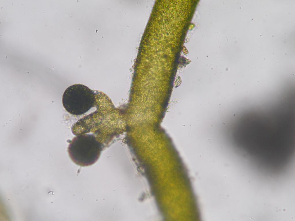 Vaucheria sp：フシナシミドロの有性生殖器官(sexial reproductive organ) coll.:2015/01/10, photo:2015/01/18 incuvated in room temp. 和歌山県田辺市：Tanabe City. Wakayama Pref. Japan